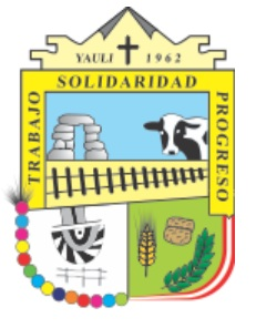 Distrito de Yauli (Huancavelica)